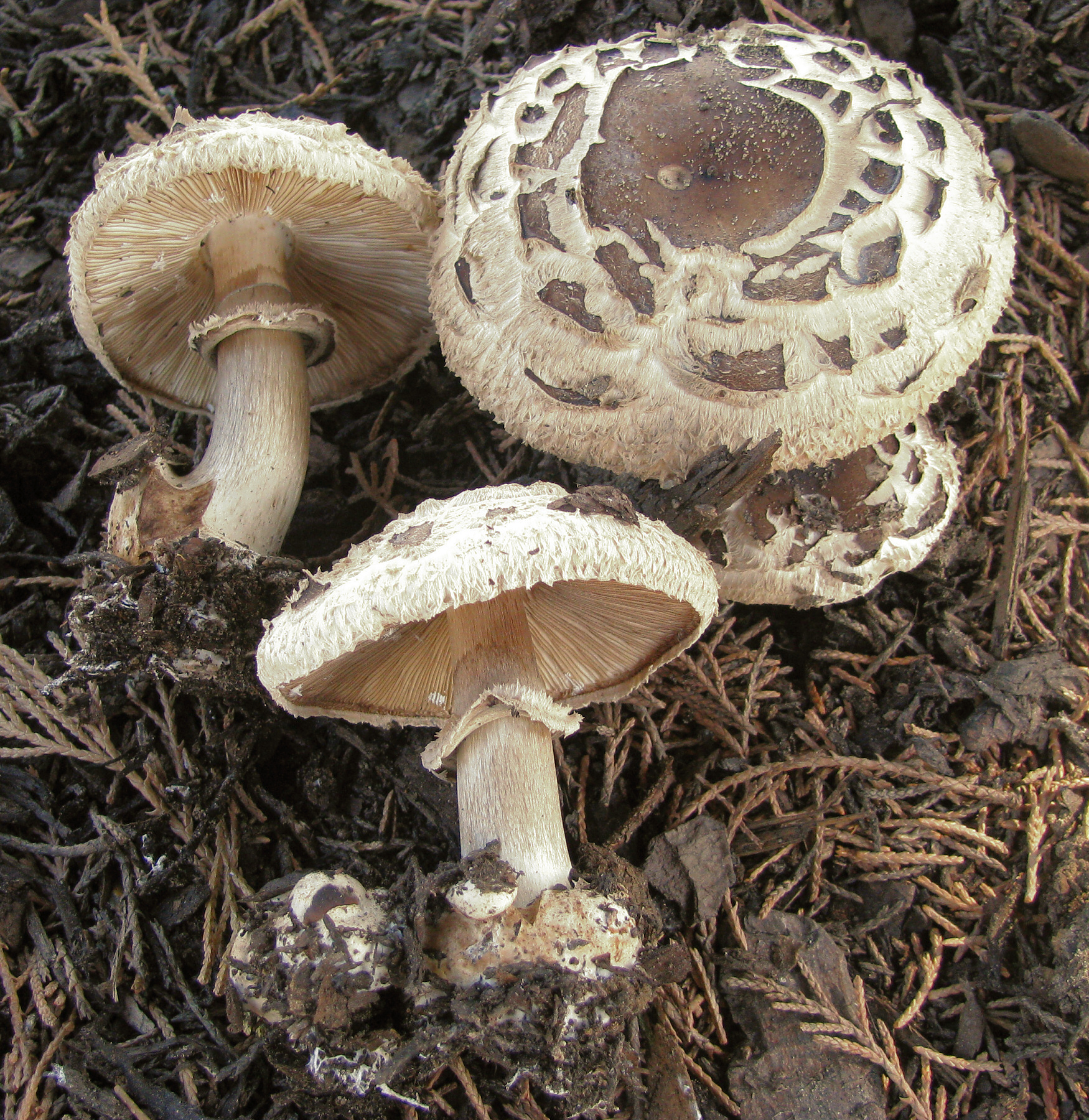 Chlorophyllum brunneum, Garten-Safranschirmling oder Großknolliger Safranschirmling, gefunden in Ingelheim am rhein, Deutschland